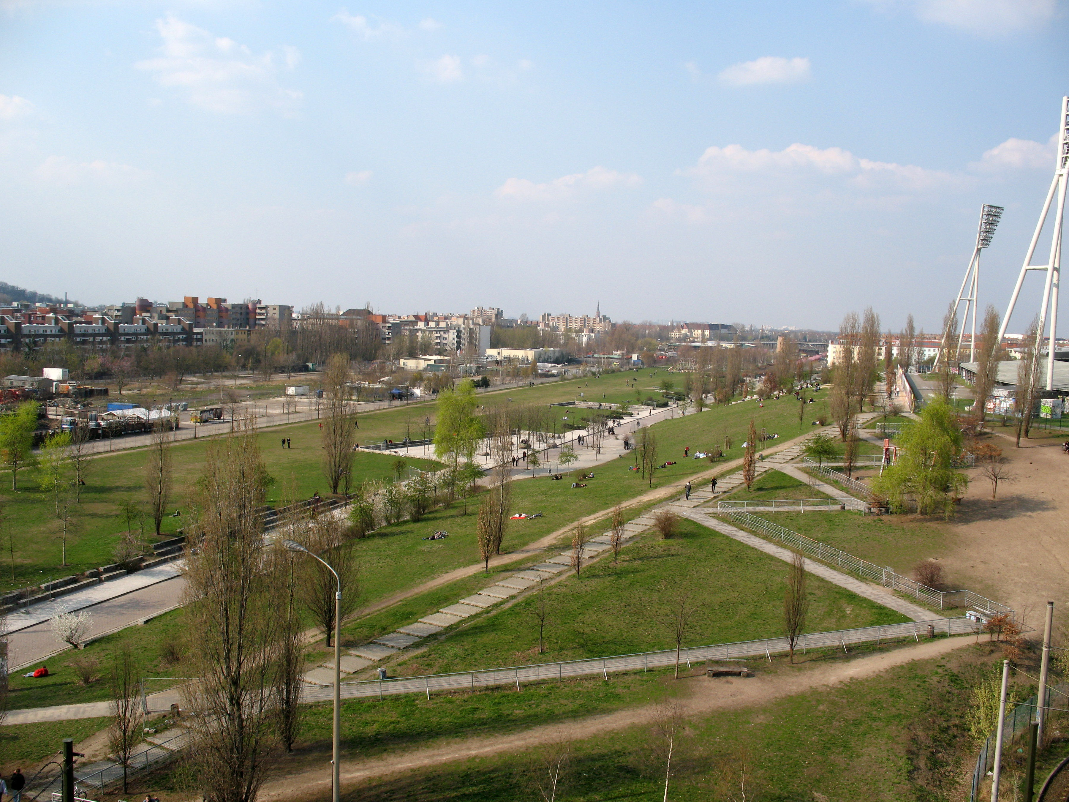 Mauerpark, 31.03.2007